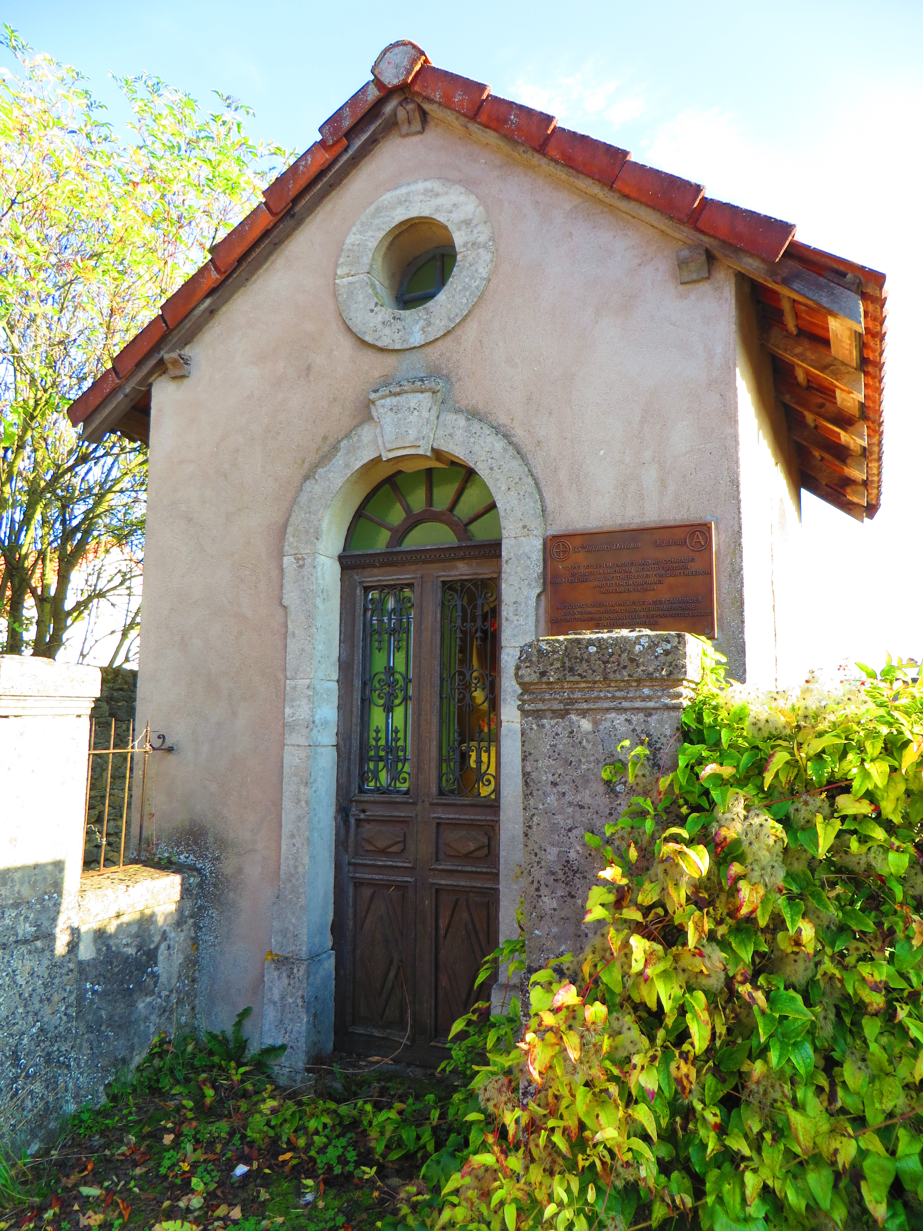 Gerbécourt la chapelle